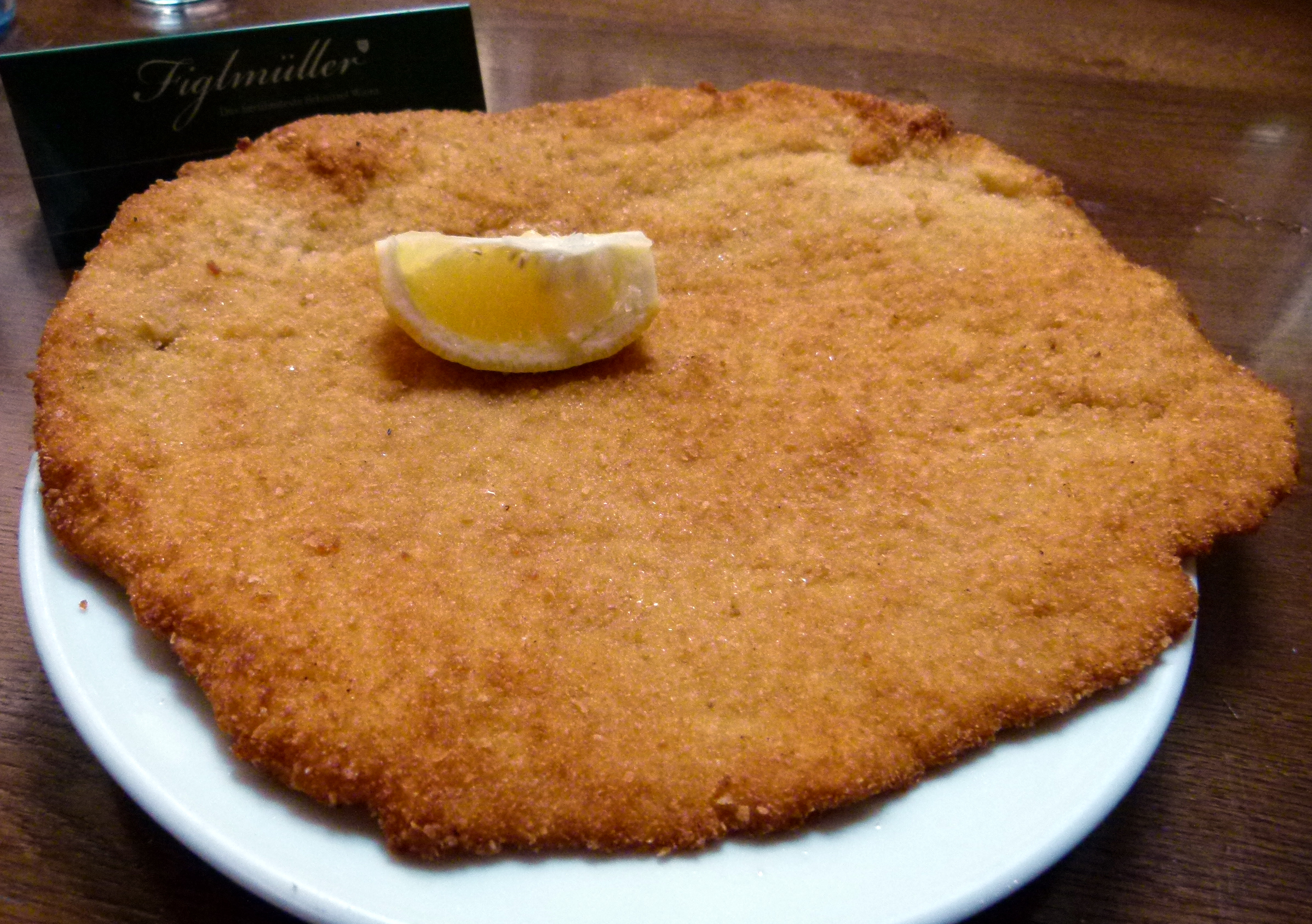 Figlmüller-Schnitzel (paniertes Schweineschnitzel) in Wien im Restaurant Figlmüller, Wollzeile, Wien